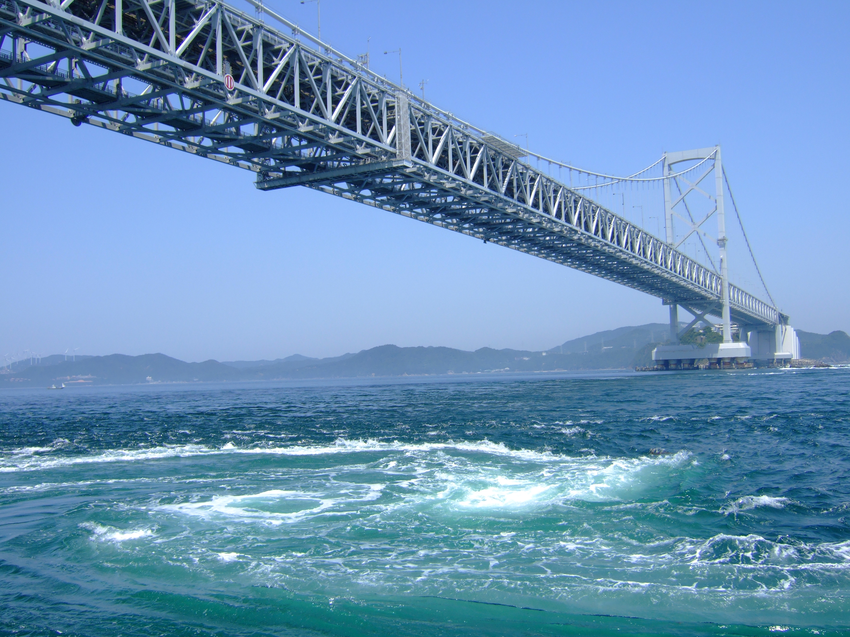 Naruto